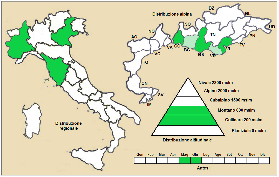 Stipa tirsa - Distribuzione in Italia